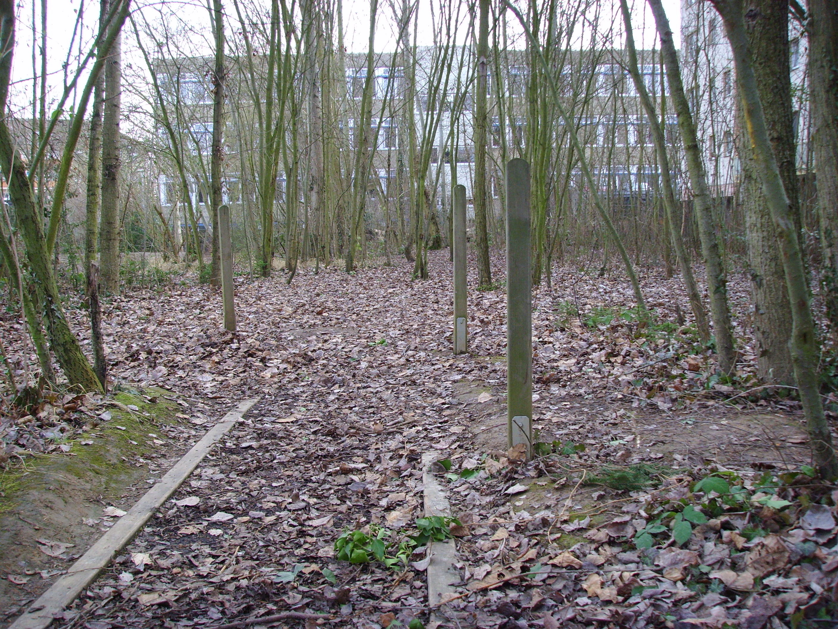 Ziehenschule, Frankfurt am Main-Eschersheim, Wäldchen des Schulgartens